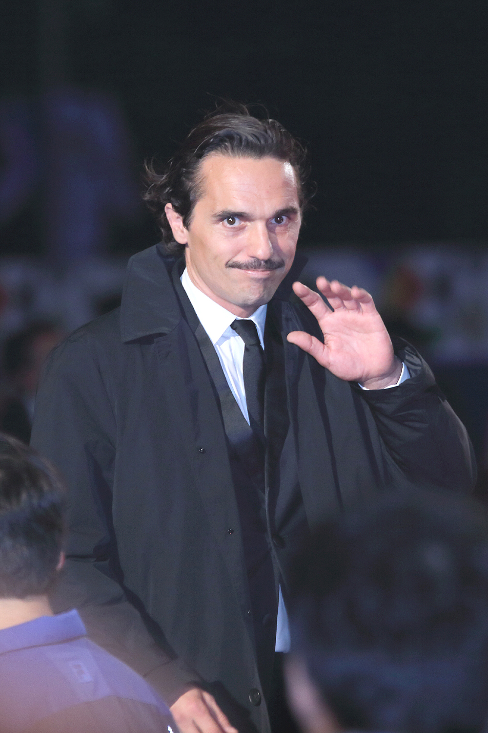 151001 부산국제영화제 개막식 레드카펫